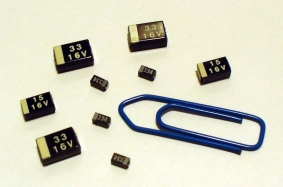 Tantal-Chip-Elektrolytkondensatoren